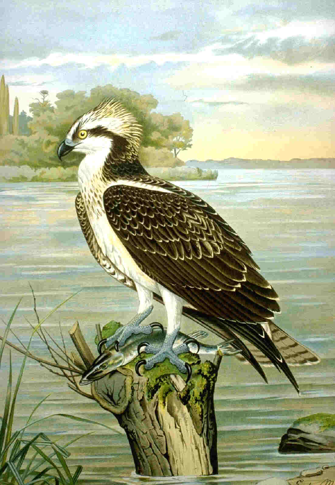 Osprey